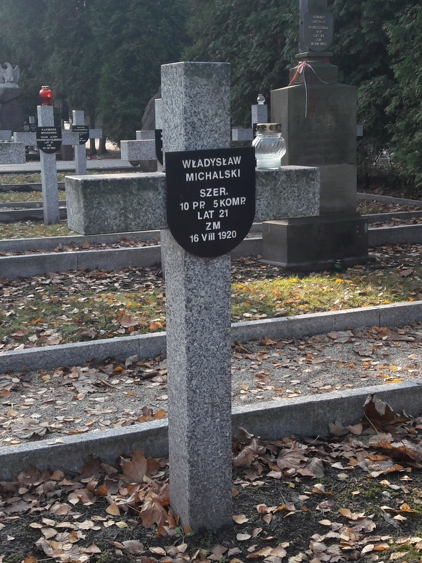 Cmentarz Wojskowy na Powązkach - grób Władysława Michalskiego, żołnierza 10 pułku piechoty, poległego w 1920 r.